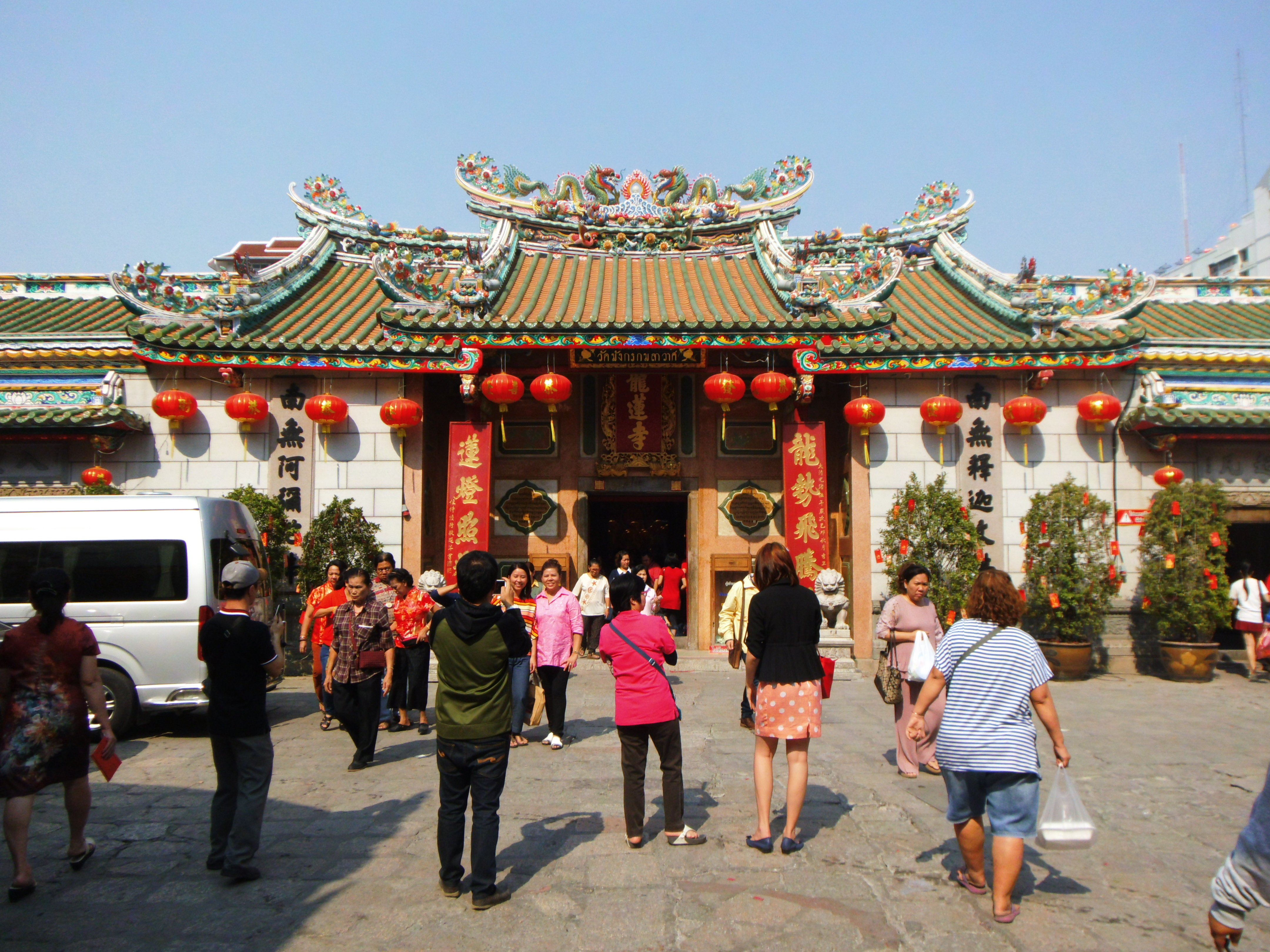 วัดมังกรกมลาวาส